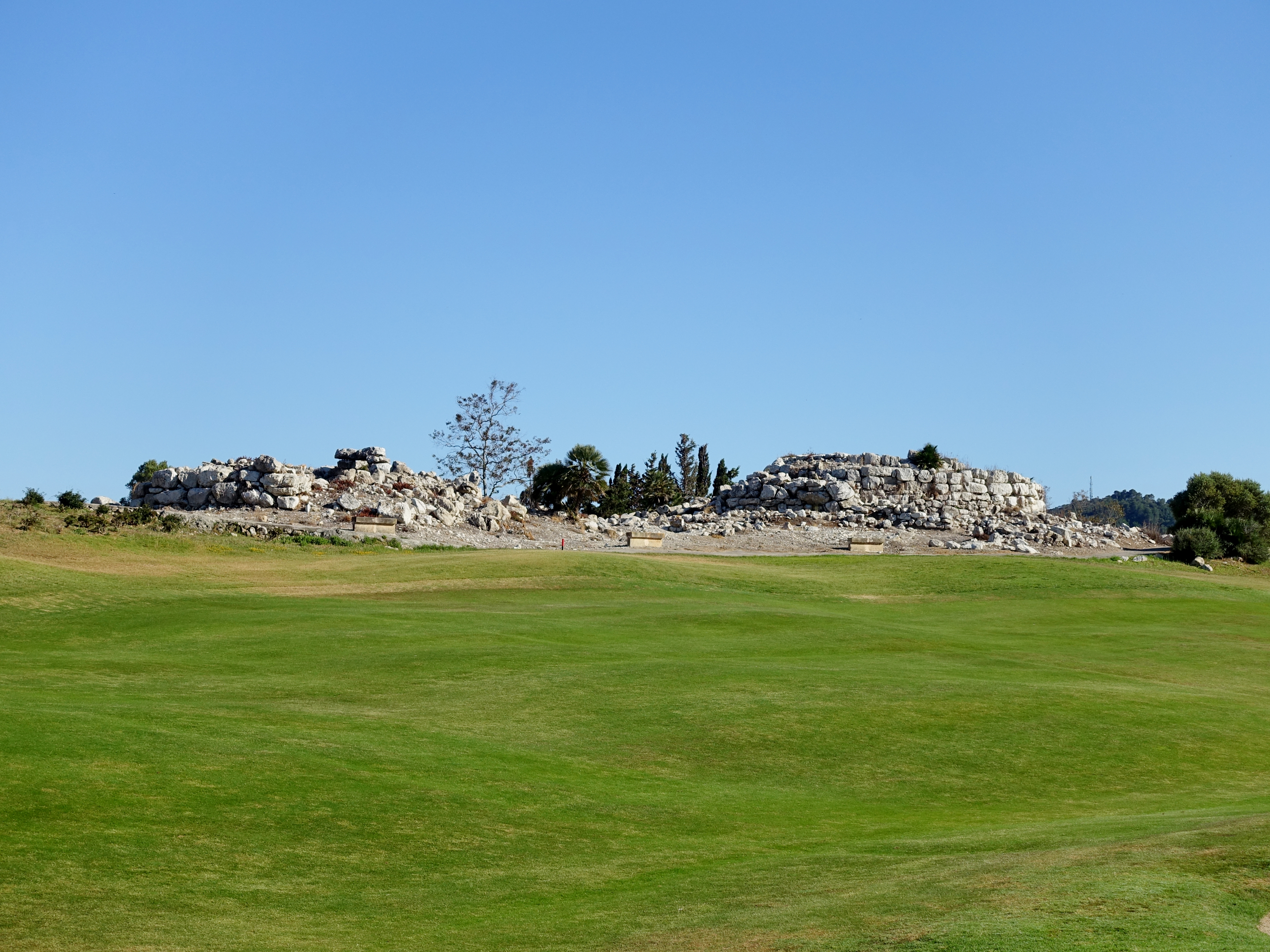 Talaiot von Pula, Gemeinde Son Servera, Mallorca, Spanien